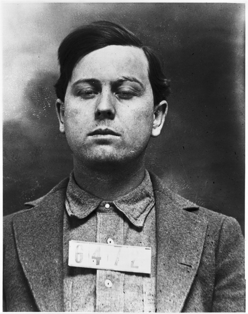 Emmett Dalton, emprisonné sous le # 6472